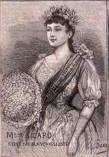 Portrait de la reine des blanchisseuses de Paris 1891, Mademoiselle Louise Sicard